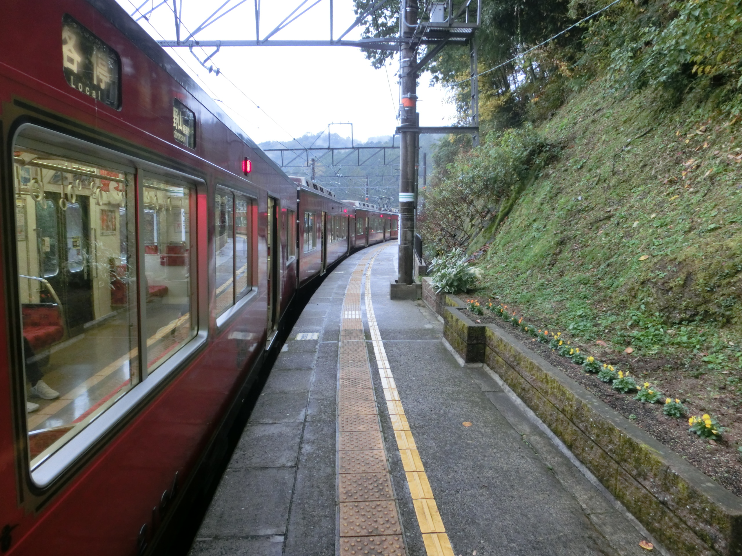 下古沢駅下りホーム